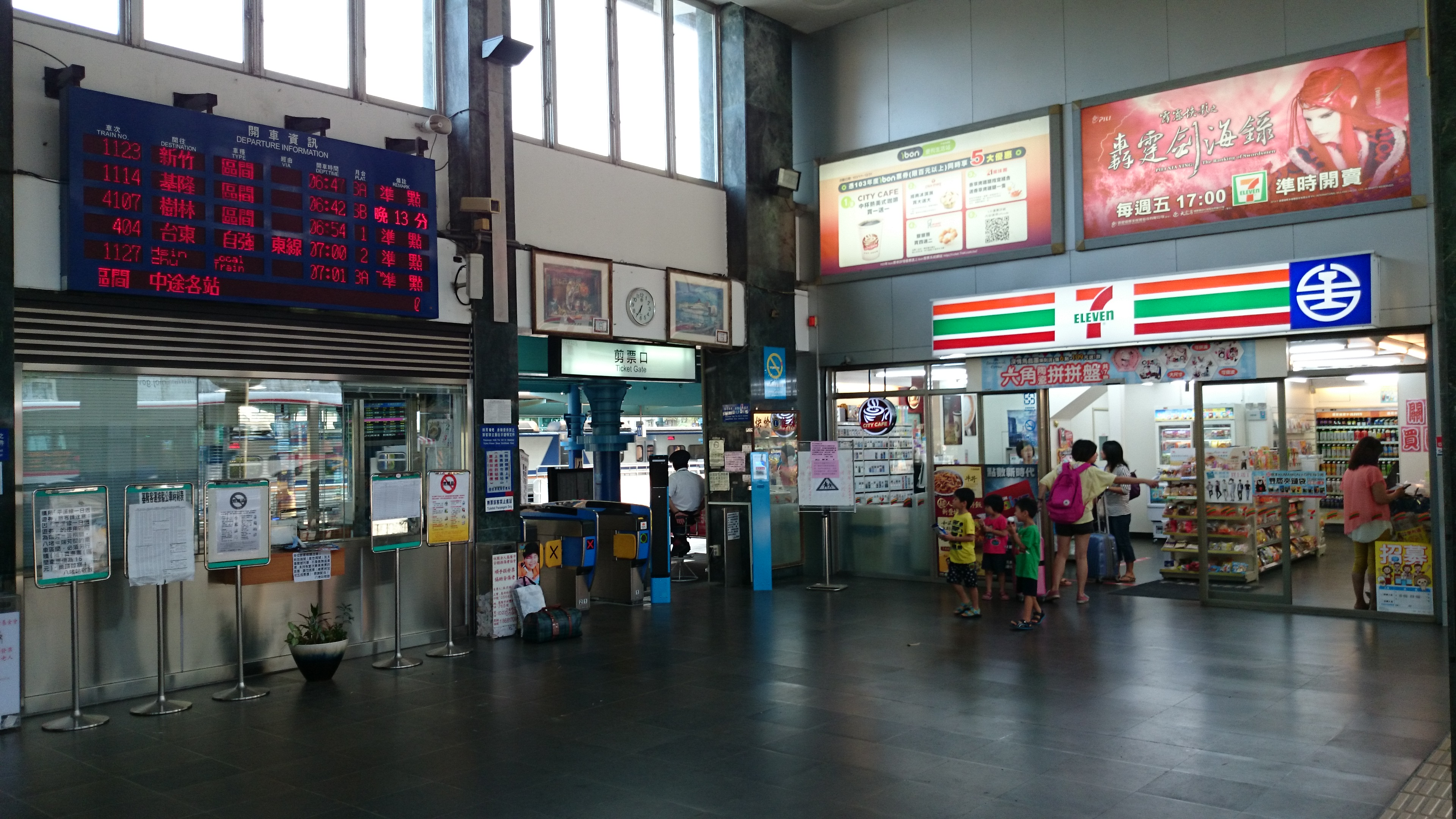 中文（台灣）: 臺灣鐵路管理局八堵車站剪票口（左）與統一超商八堵站門市（右）。